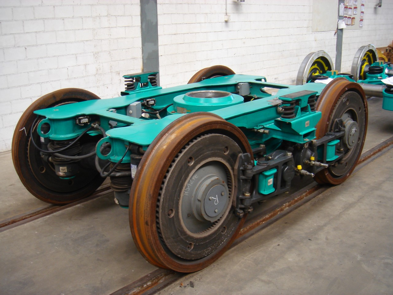 LEILA-Drehgestell in den Werkhallen der Herstellerin Josef Meyer AG Rheinfelden